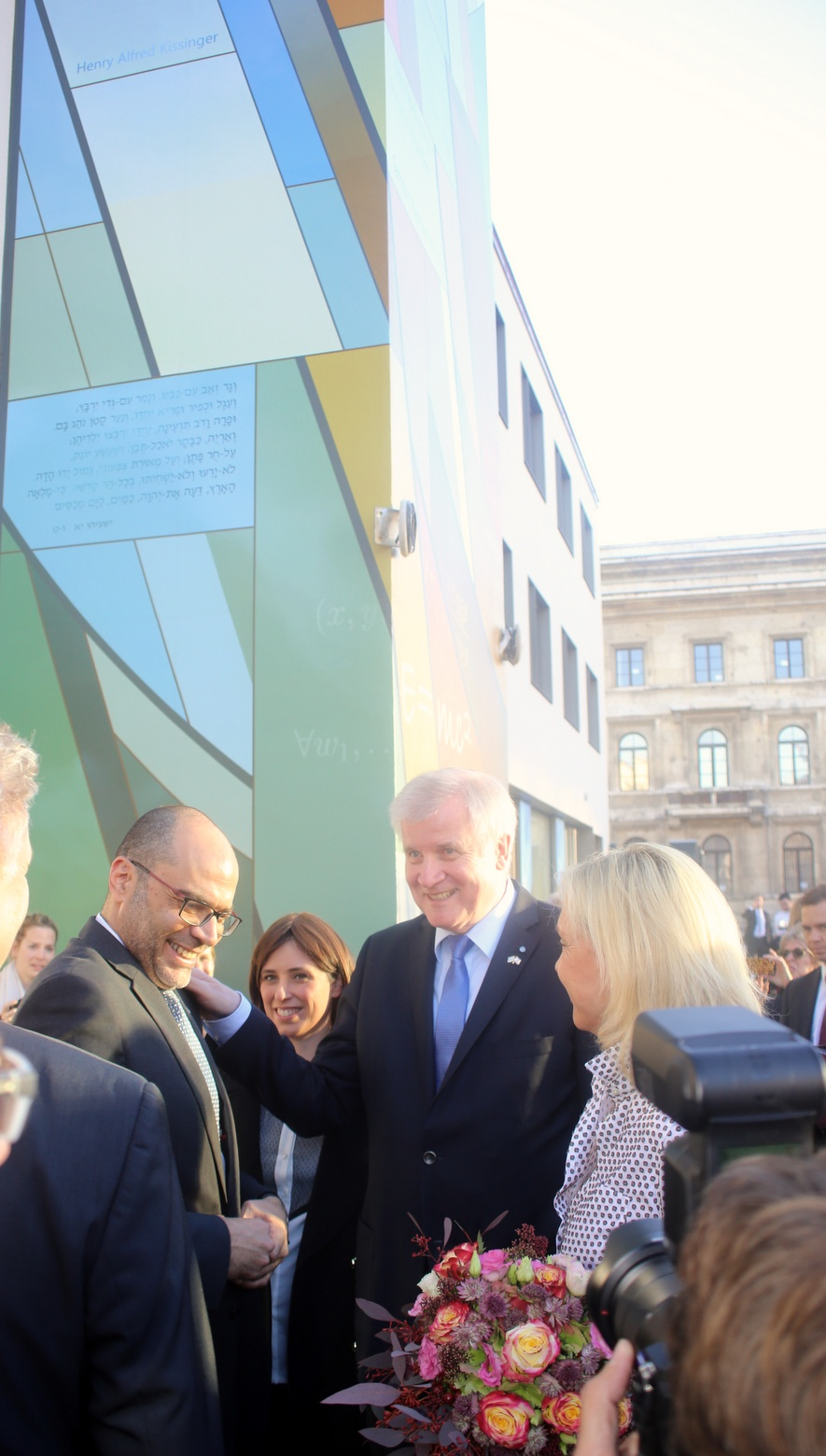 10. November 2015 - Der neue Sitz des Generalkonsulats des Staates Israel in München wird eingeweiht. Auf dem Bild (v.l.n.r.): Generalkonsul Dan Shaham, Tzipi Hotovely (stellvertretende israelische Außenministerin), Horst Seehofer (Bayerischer Ministerpräsident), Beate Merk (Staatsministerin für Europaangelegenheiten und regionale Beziehungen) Titel des Werks: "10. November 2015 - Neuer Sitz des Generalkonsulats des Staates Israel, München (Einweihung)"